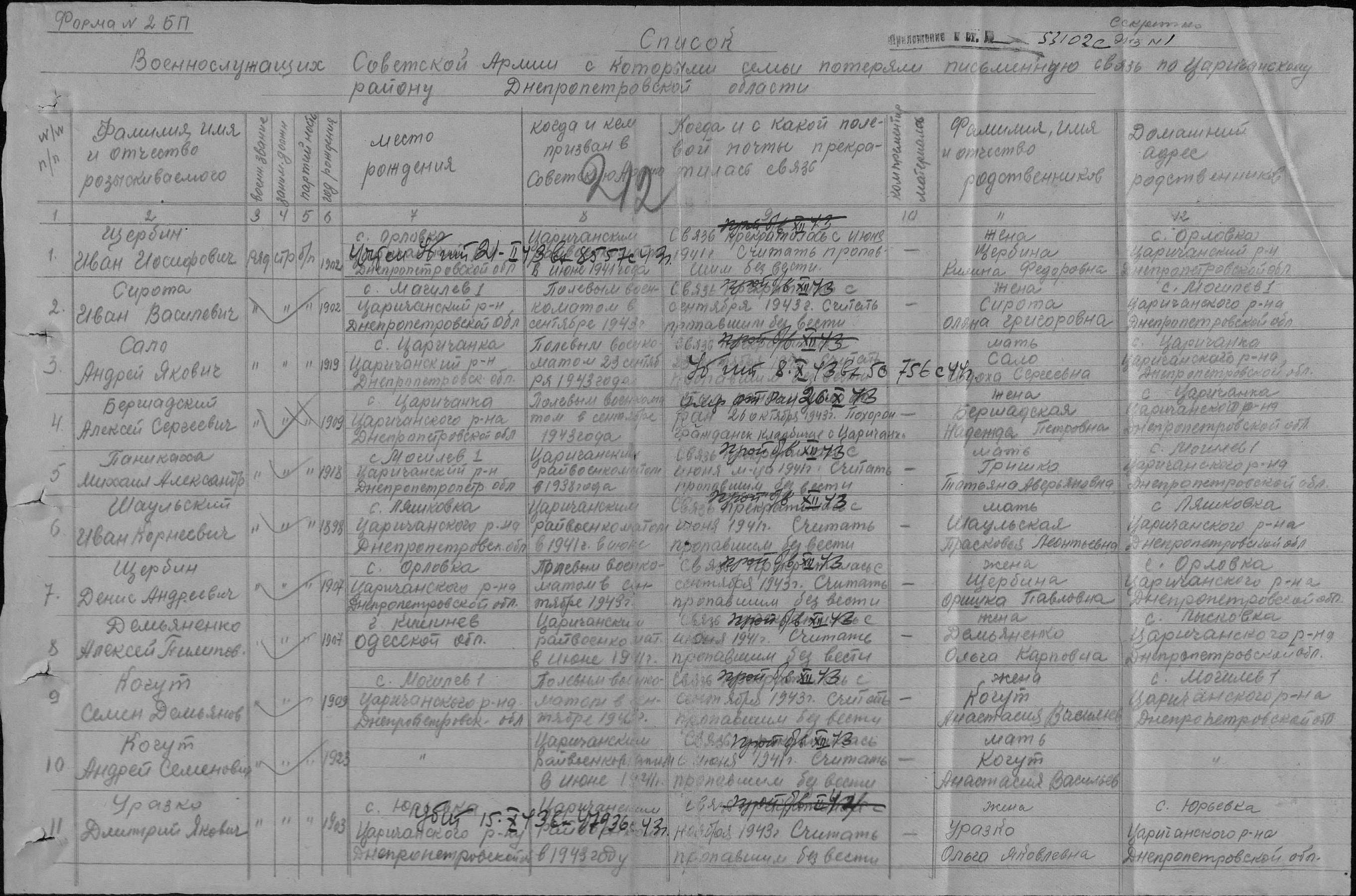 Список военнослужащих советской армии, с которыми семьи потеряли письменную связь по Царицынскому району Днепропетровской области